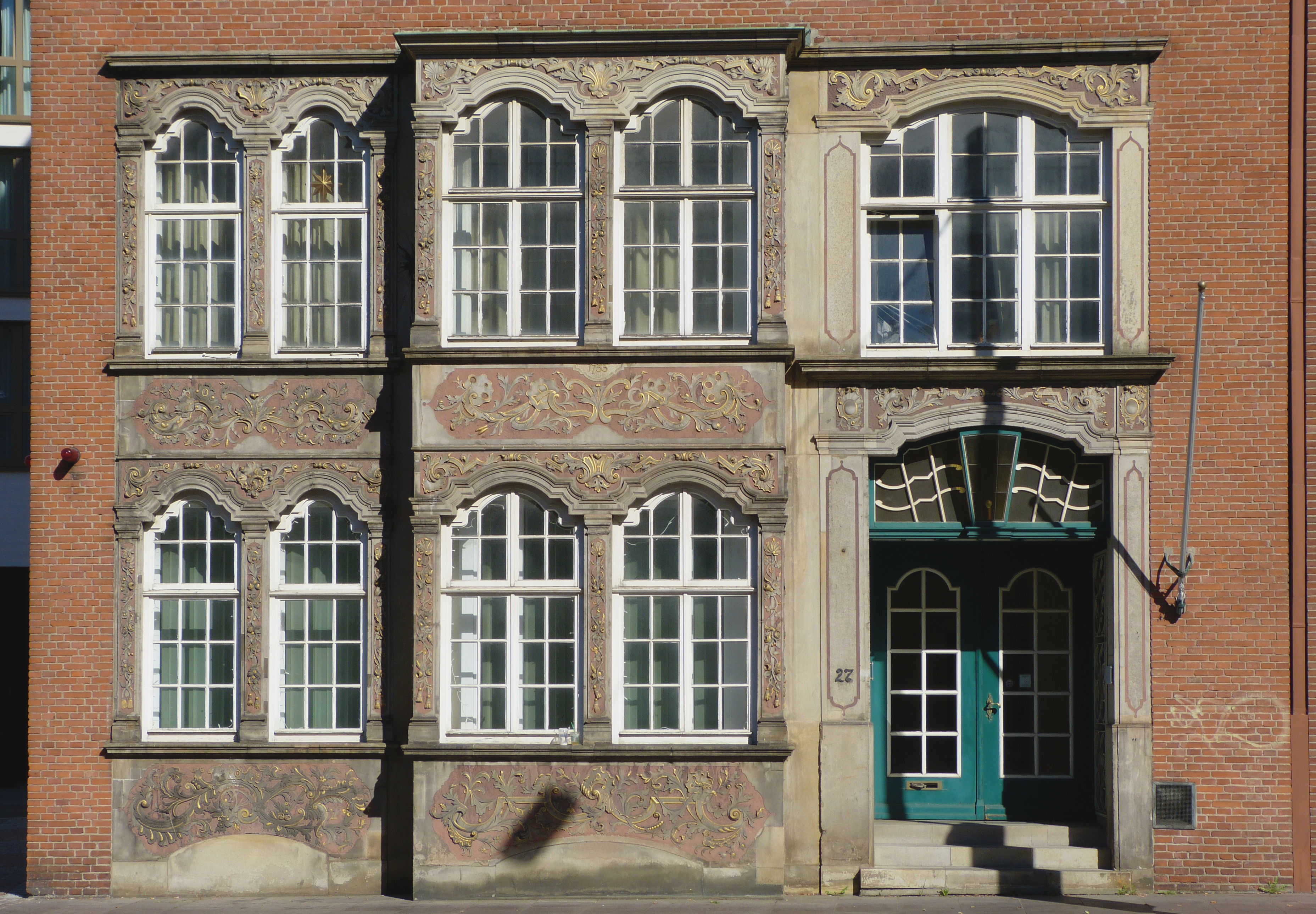 Wohnhaus in Bremen, Martinistraße 27Das abgebildete Objekt ist ein geschütztes Kulturdenkmal in der Freien Hansestadt Bremen, mit der Nr. 0877 beim Landesamt für Denkmalpflege registriert.